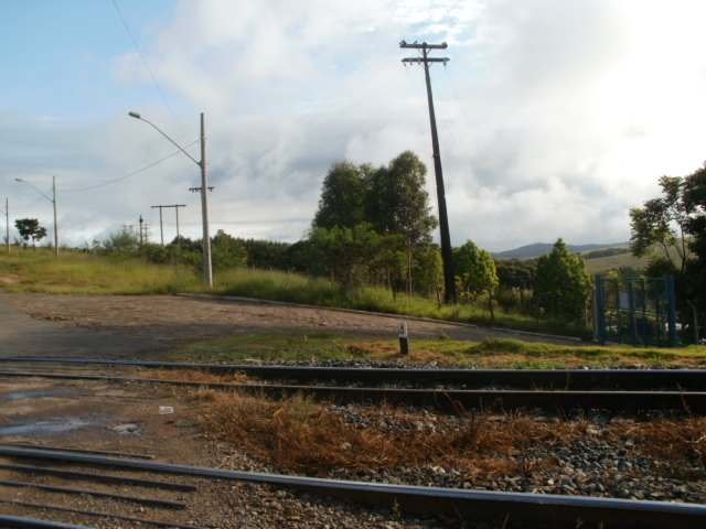 Vista da estação ferroviária de São Vicente de Minas, Minas Gerais, Brasil.